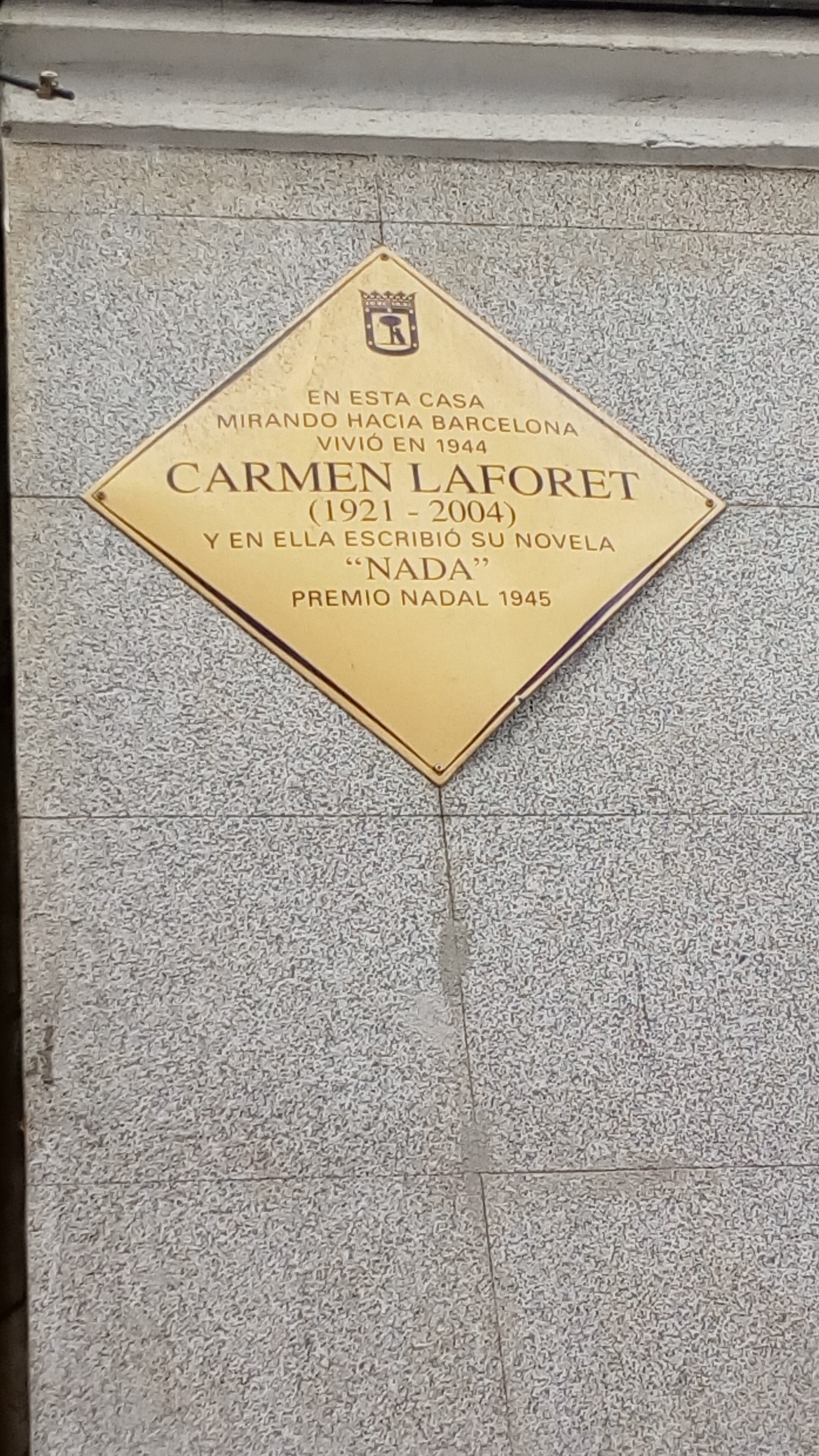 Placa casa donde escribió Nada